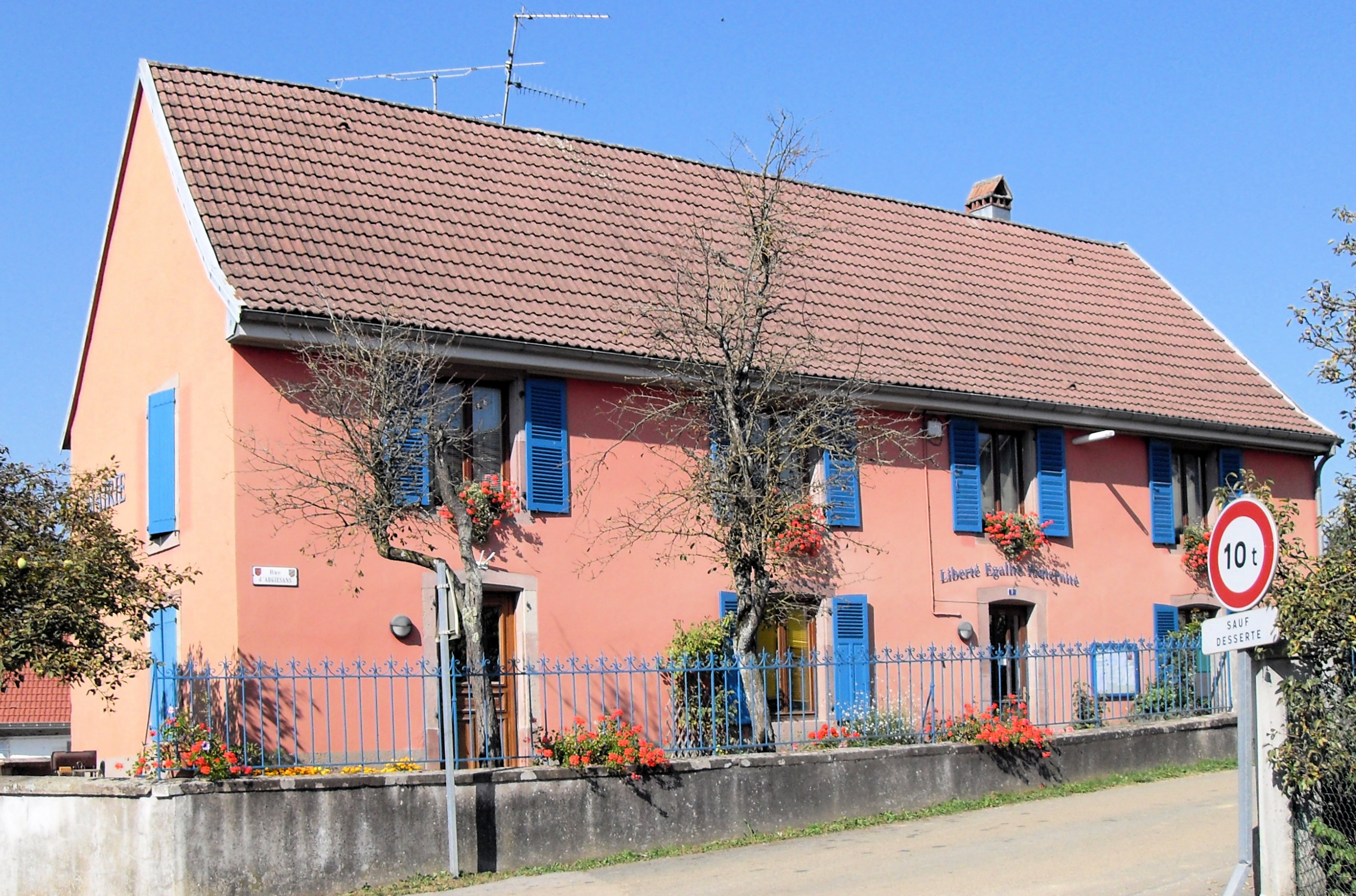 La mairie de Banvillars